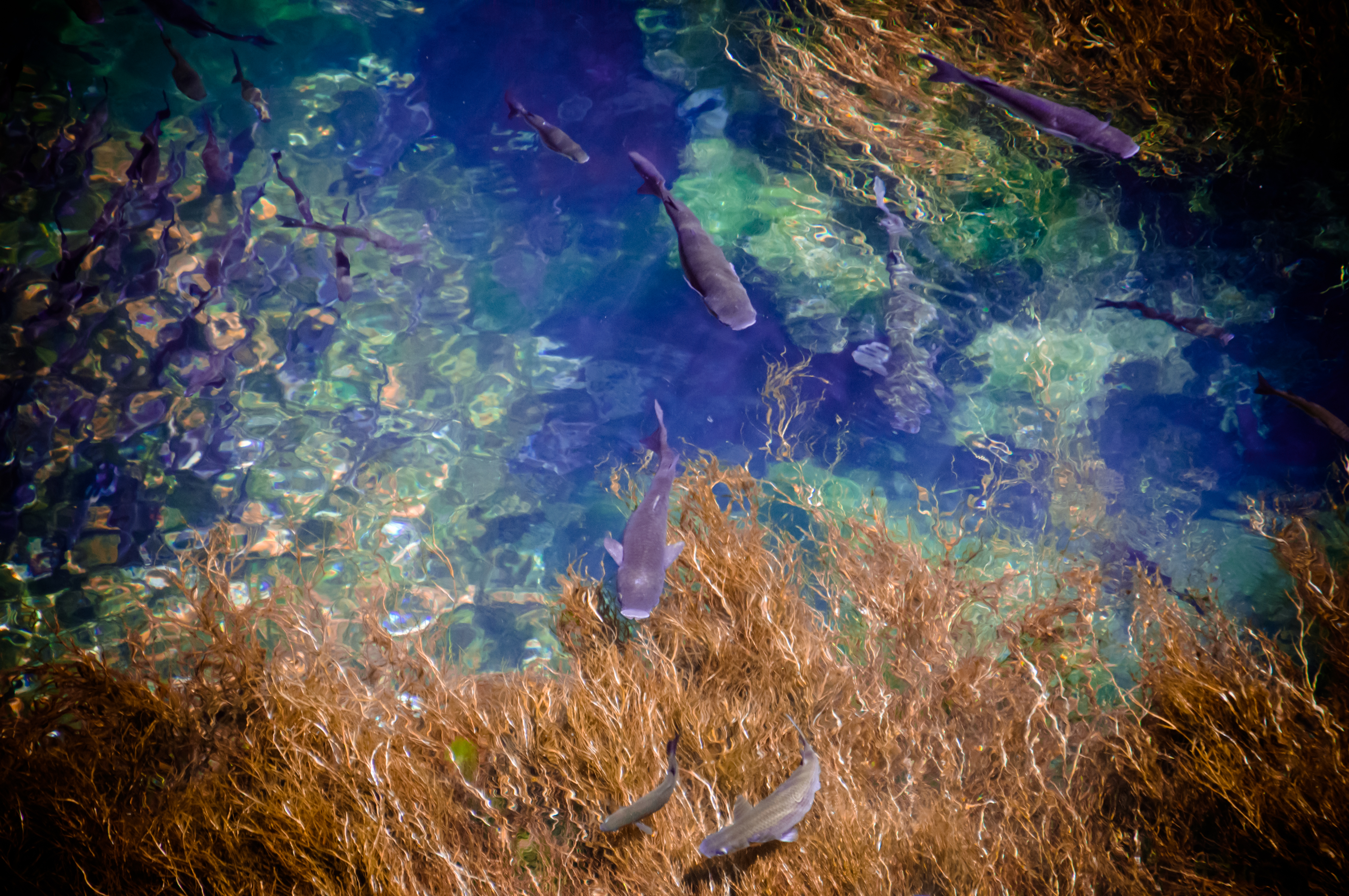 Fontana de Aretusa, Siracusa